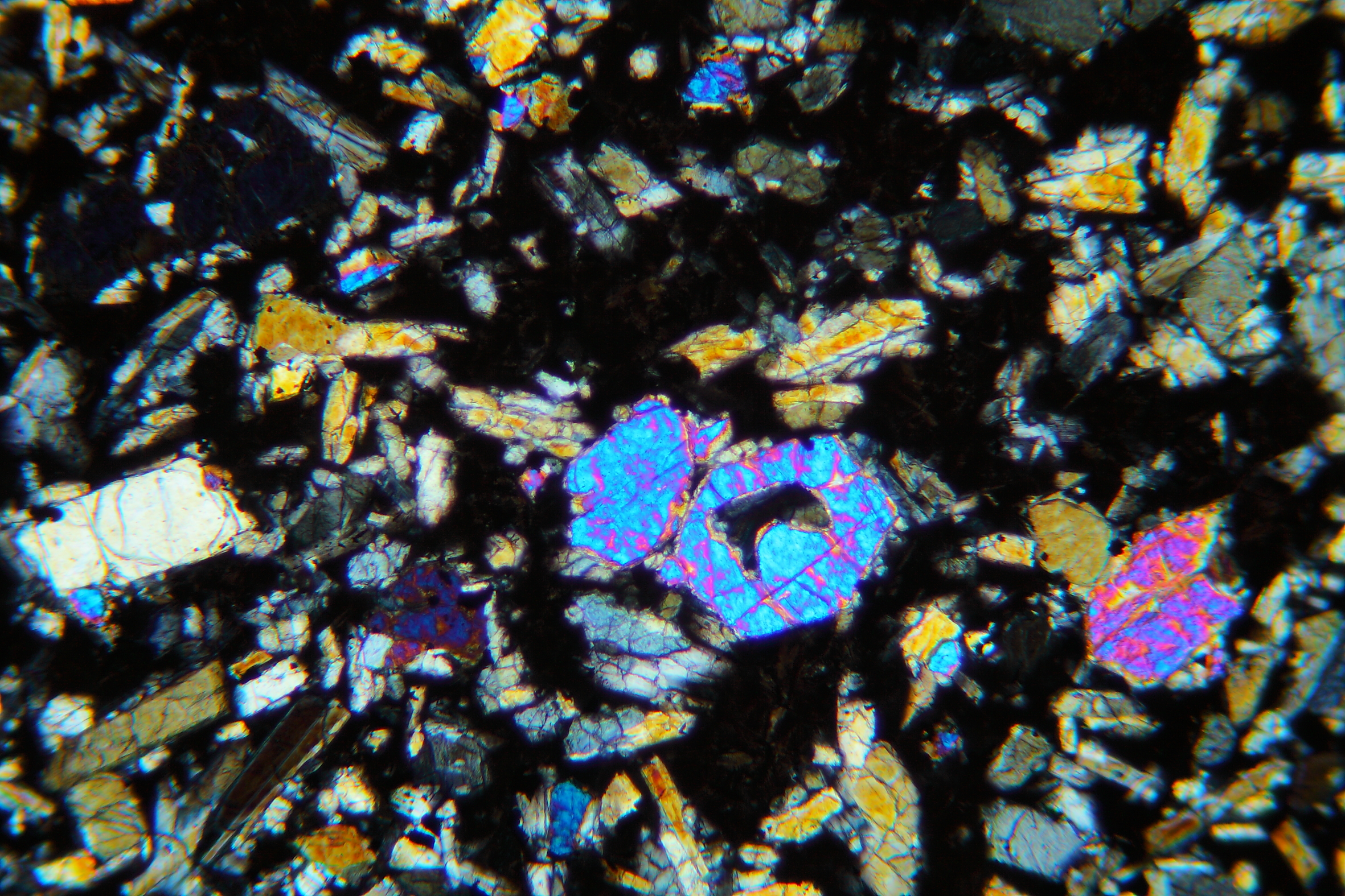 Limburgit (Dünnschliff, XPL)